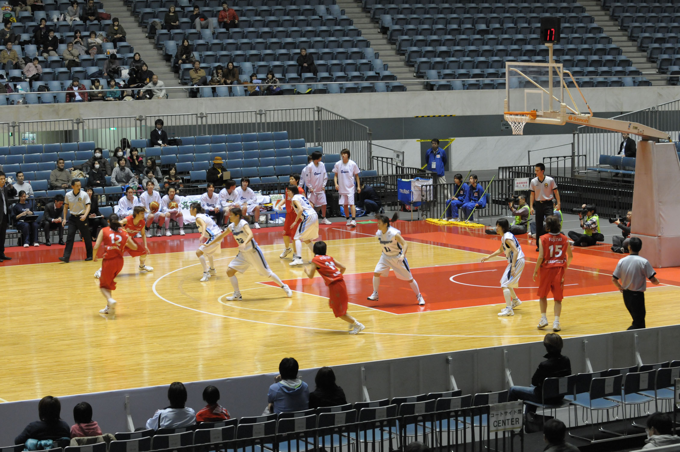 2012年全日本総合バスケットボール選手権大会3回戦、富士通レッドウェーブ対日立ハイテククーガーズ。代々木第一体育館で。